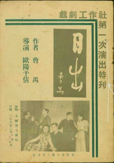 1936年话剧《日出》首演特刊封面